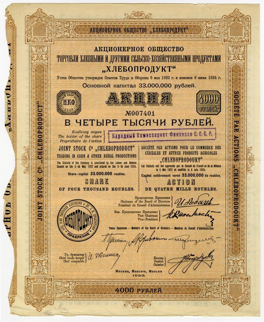 Акция в 4 тыс. руб., именная, Акционерного общества торговли хлебом и другими сельскохозяйственными продуктами "Хлебопродукт". Москва, 1923 г.